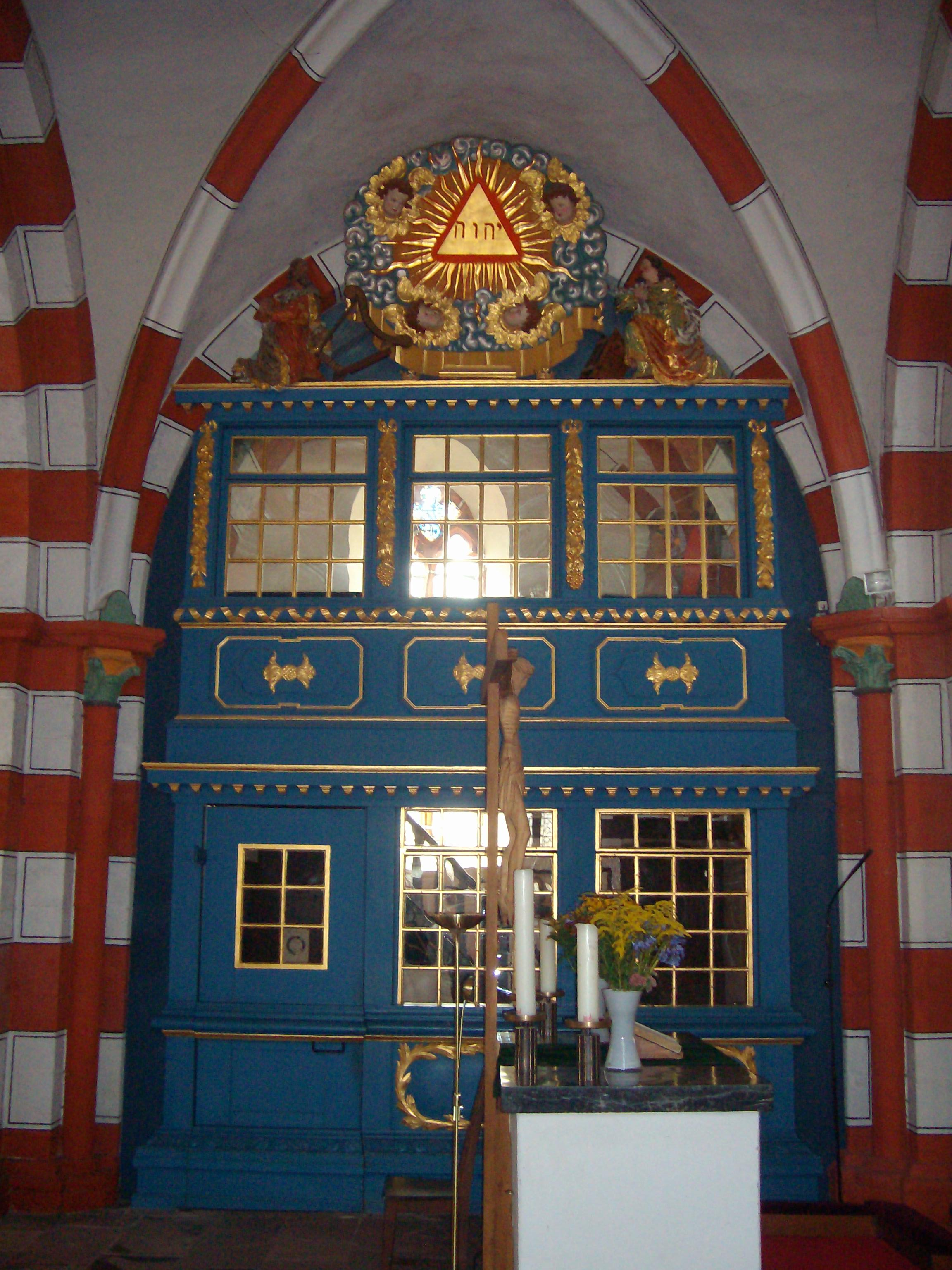 Herrschaftsstuhl in der Evang. Stadtkirche in Laubach, Hessen